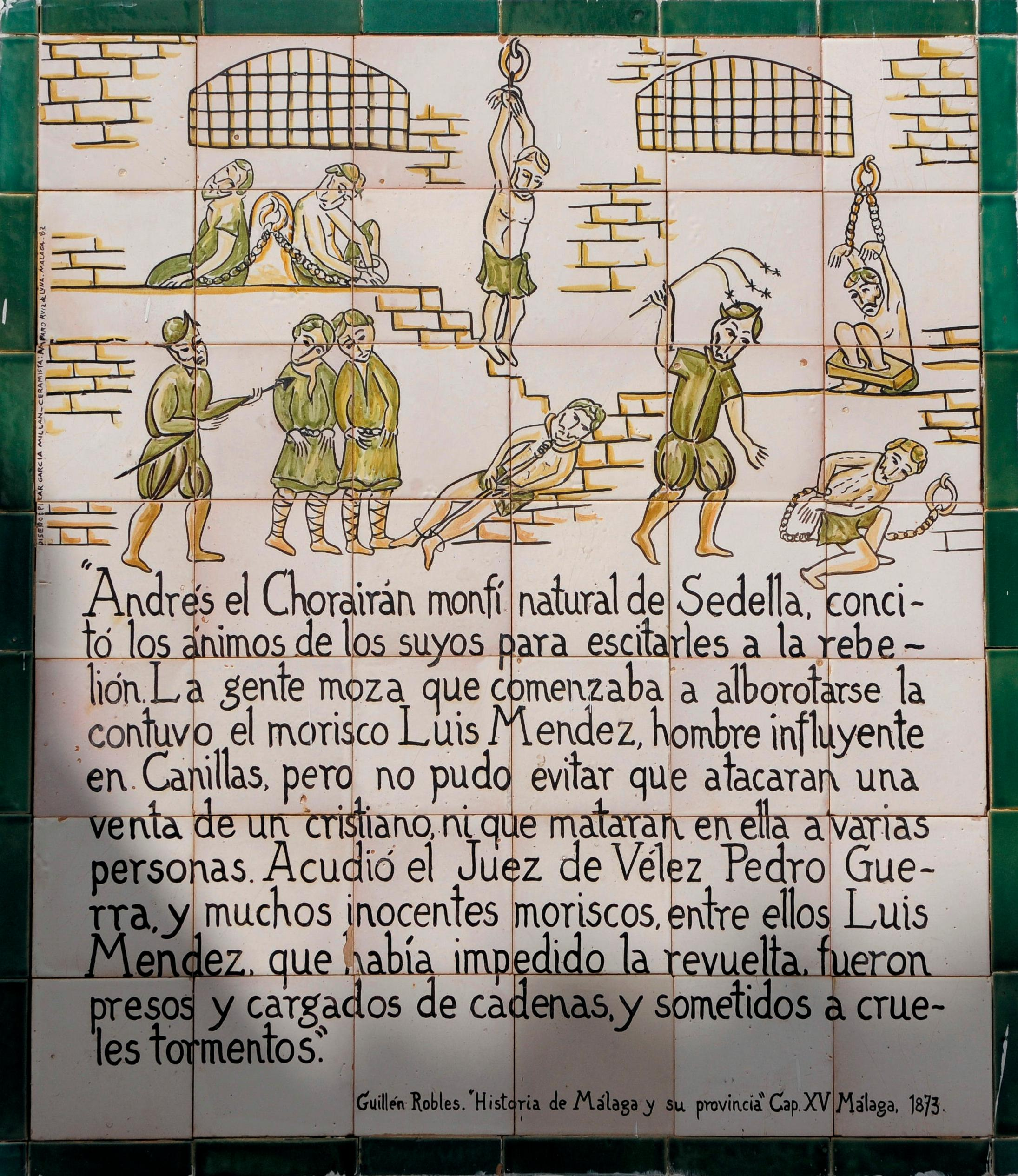 Placa sobre la historia de los moriscos en Frigiliana, Málaga, España.